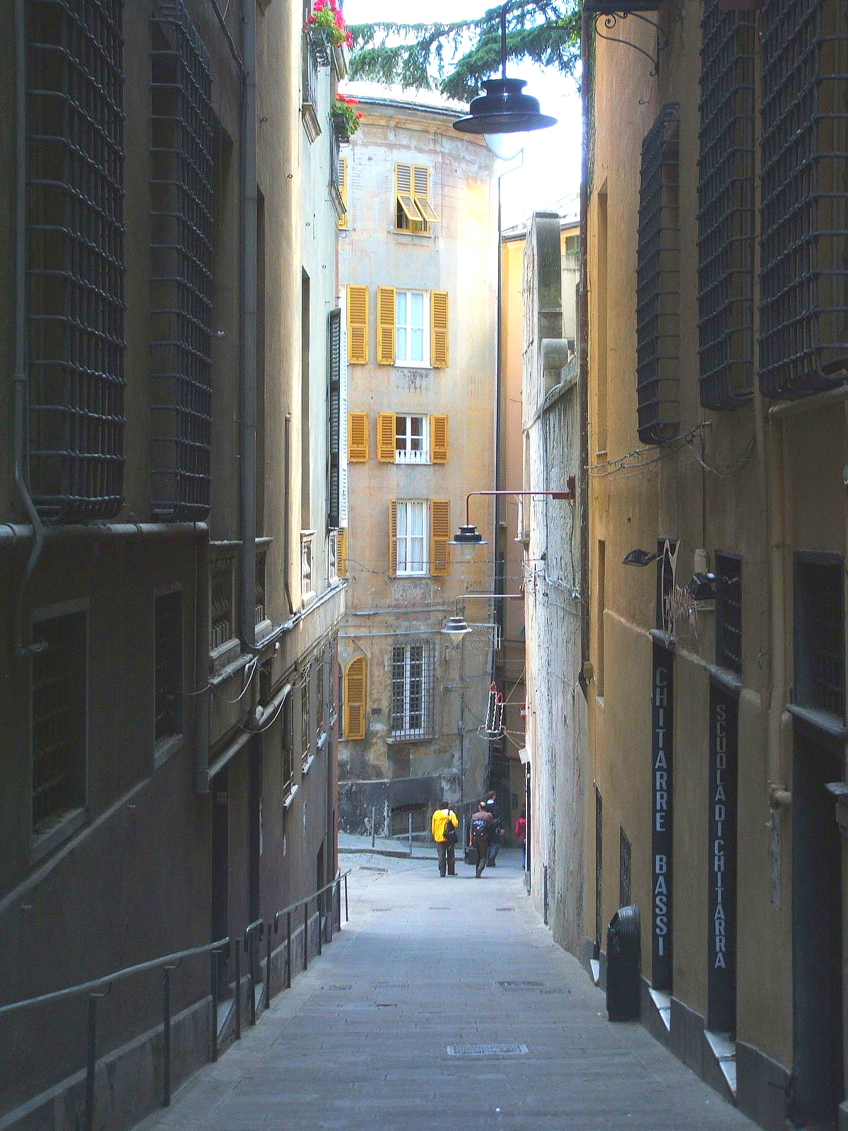 Genova Caruggio del centro storico (vico del Ferro), da via Garibaldi